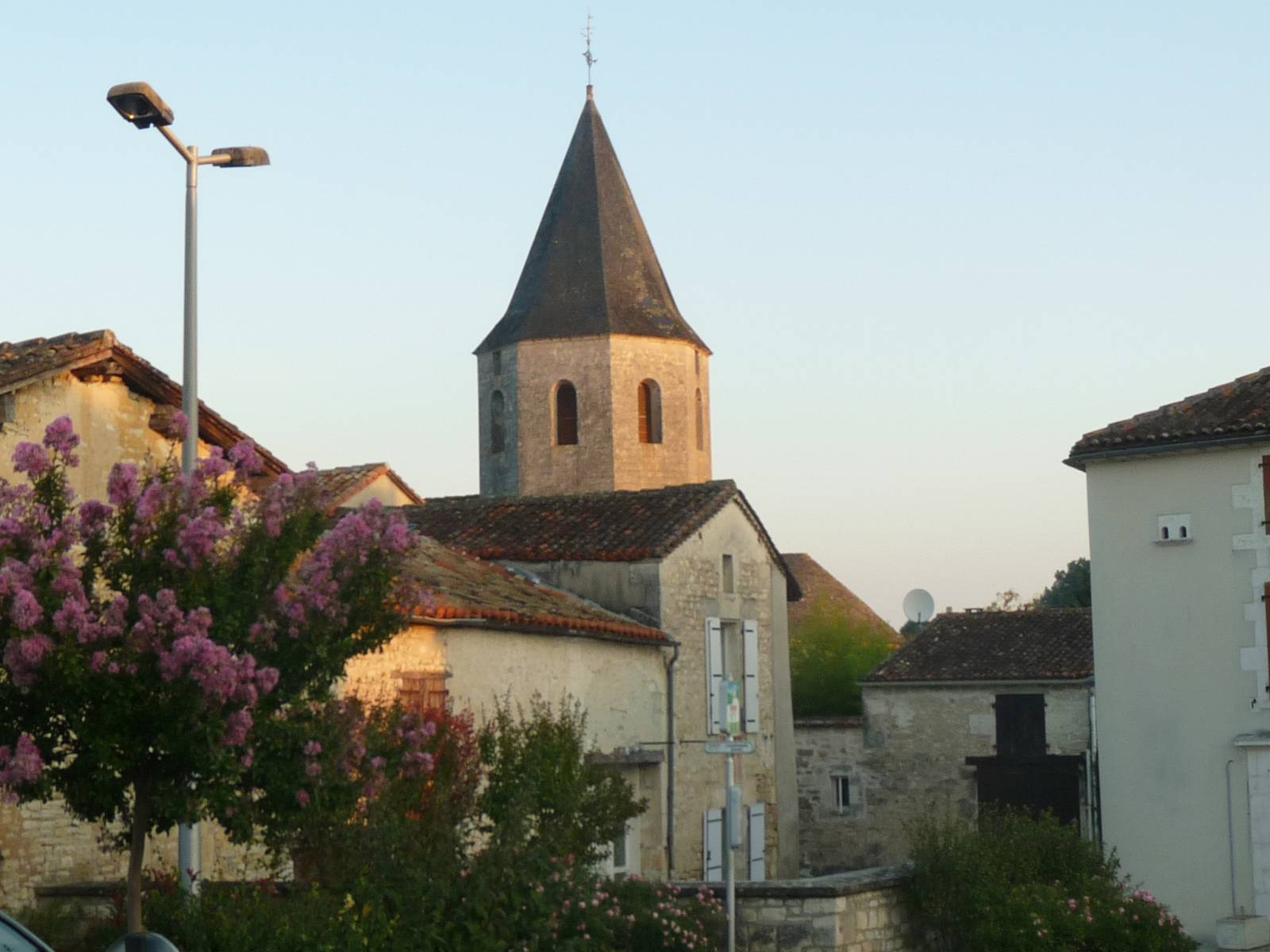 église de Champniers (16), France